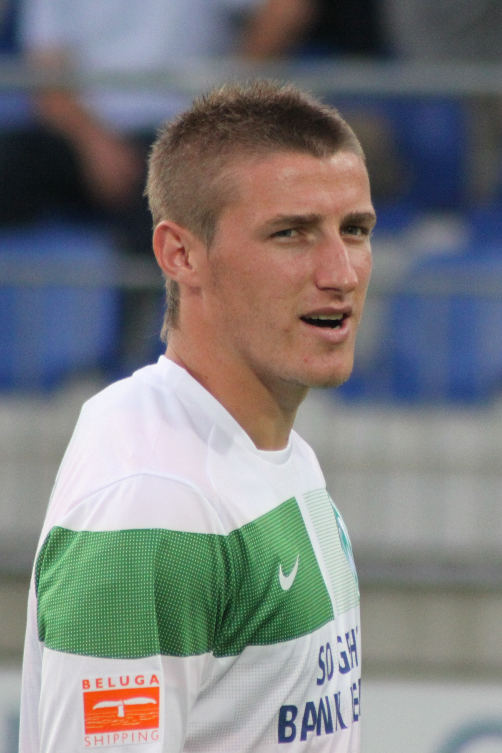 Said Husejinović - SV Werder Bremen (1)